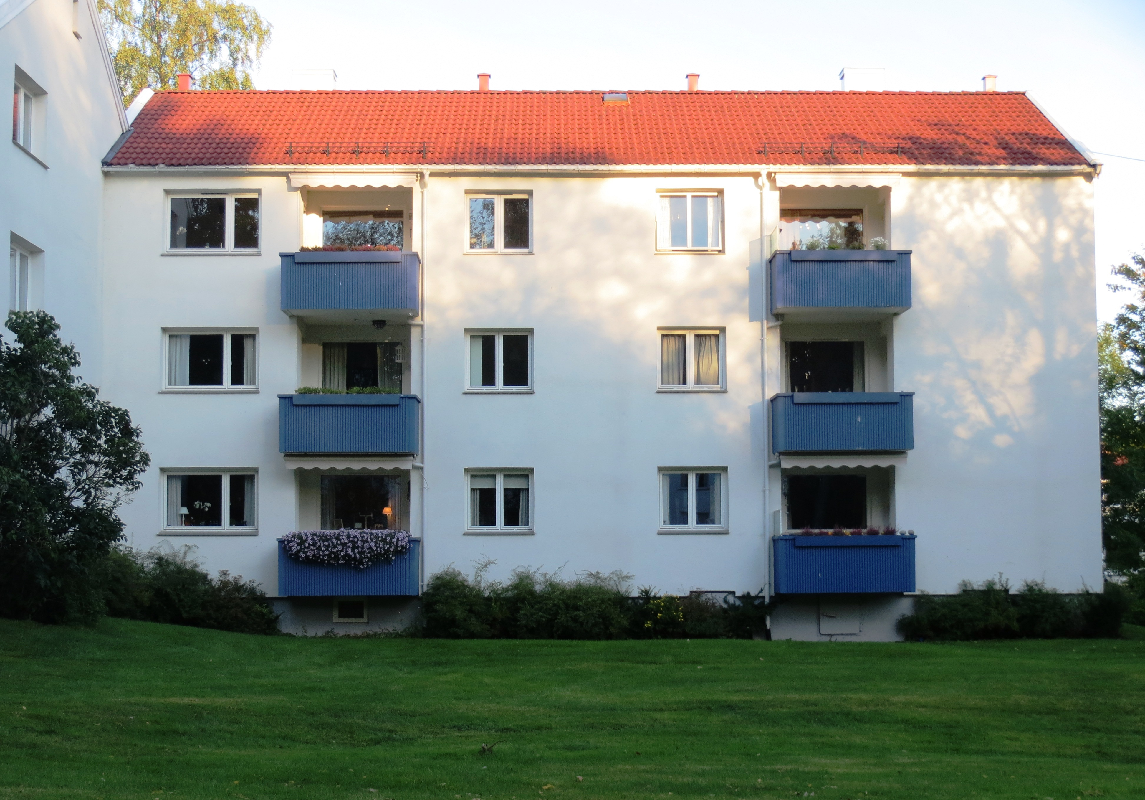 De funksjonalistiske blokkene i Vassfaret er kommunalt listeført for bygningsvern. Gressbanen, bydel vestre Aker i Oslo.